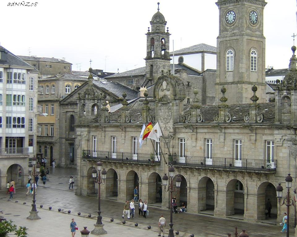 Town Hall / Ayuntamieno en Plaza de España o Plaza Mayor de Lugo.